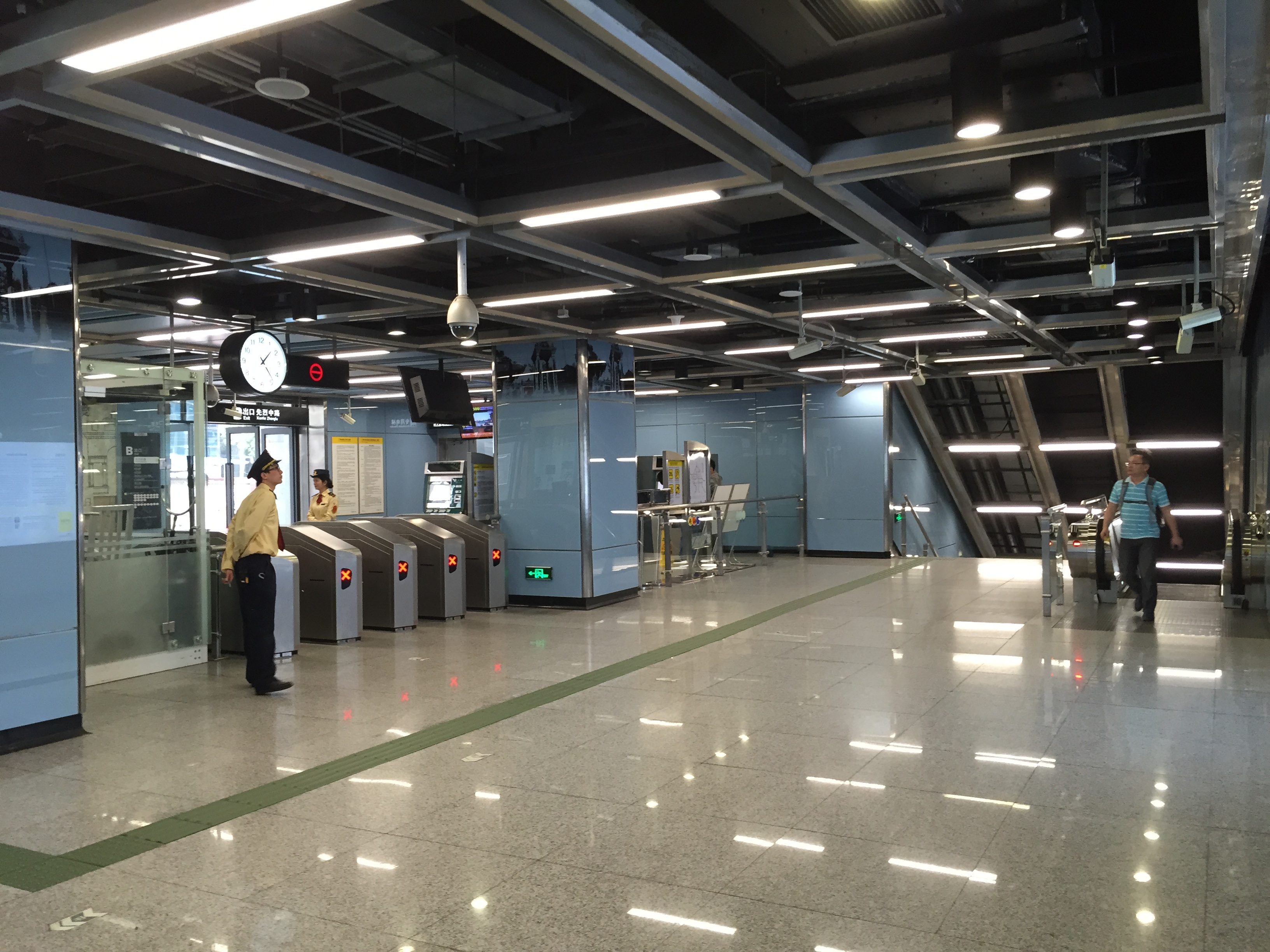 广州地铁黄花岗站北站厅